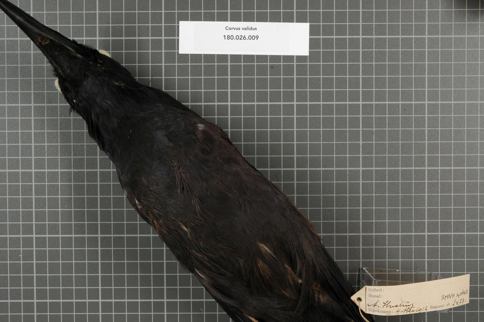 Corvus validus Bonaparte, 1851